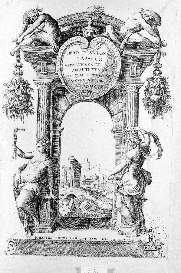 Frontespizio de Libro appartenente a l'architettura di Antonio Labacco